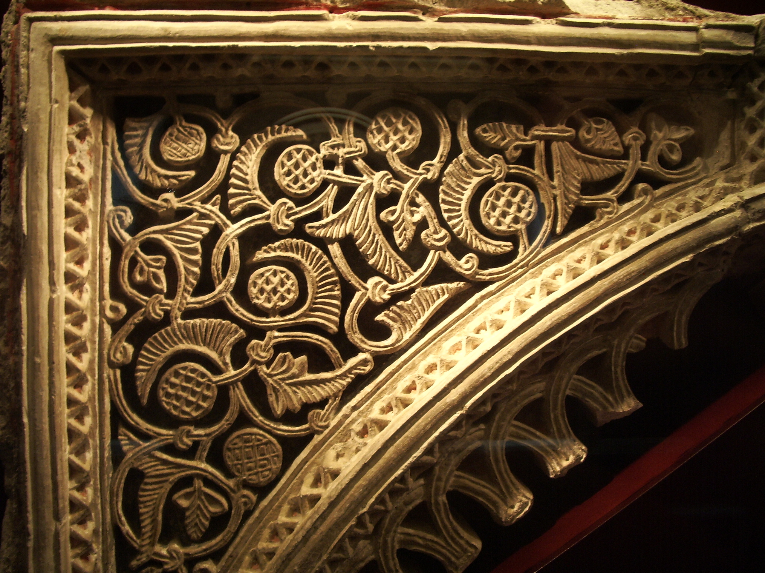 Decoración geométrica mudéjar-siglo XIV-palacios cristianos de la Aljaferia